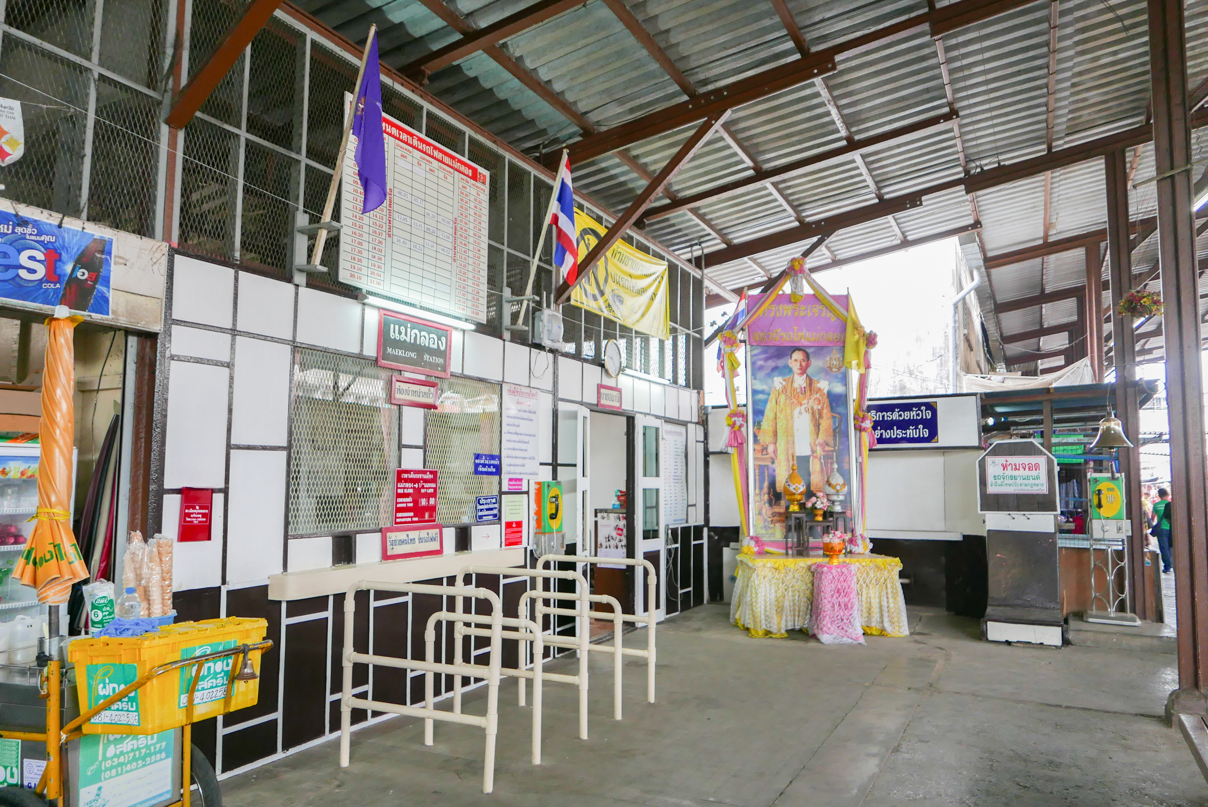 タイ国鉄メークローン線、メークローン駅（出札口とホーム）